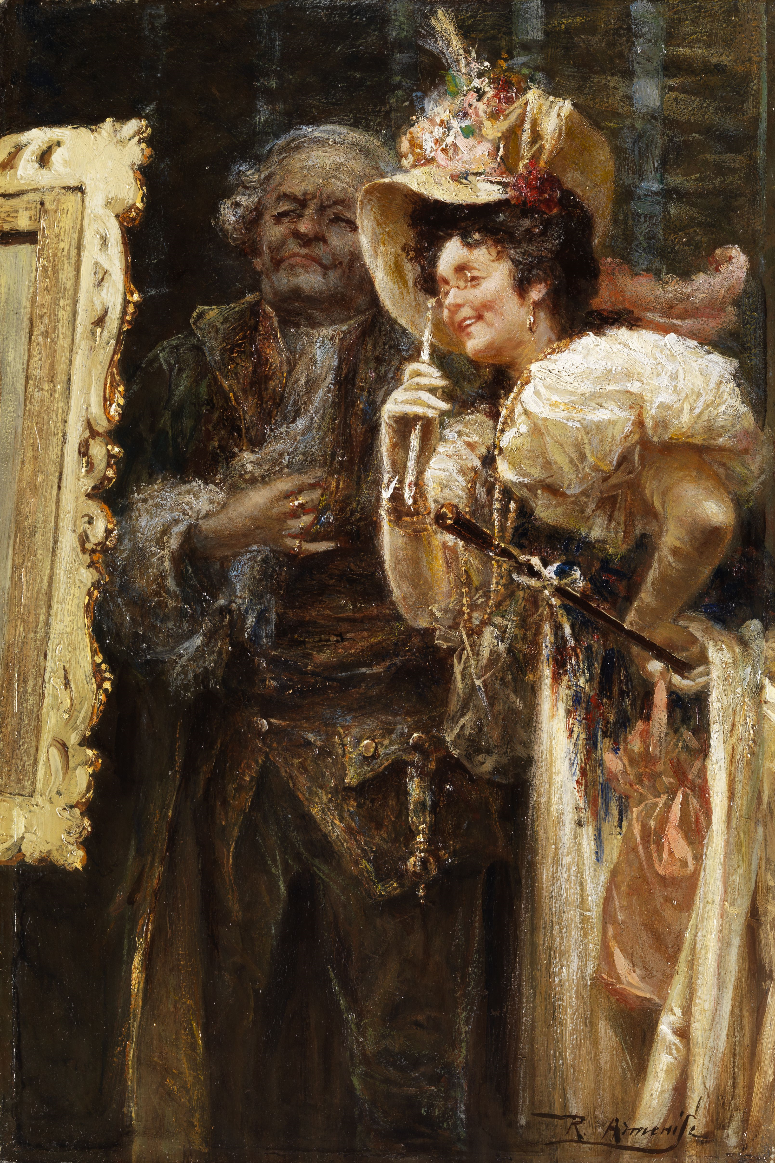 Bildbetrachtung im Maleratelier. Öl auf Malpappe. 50 x 39,5 cm.